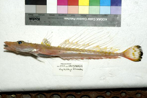 Hoplichthys filamentosus